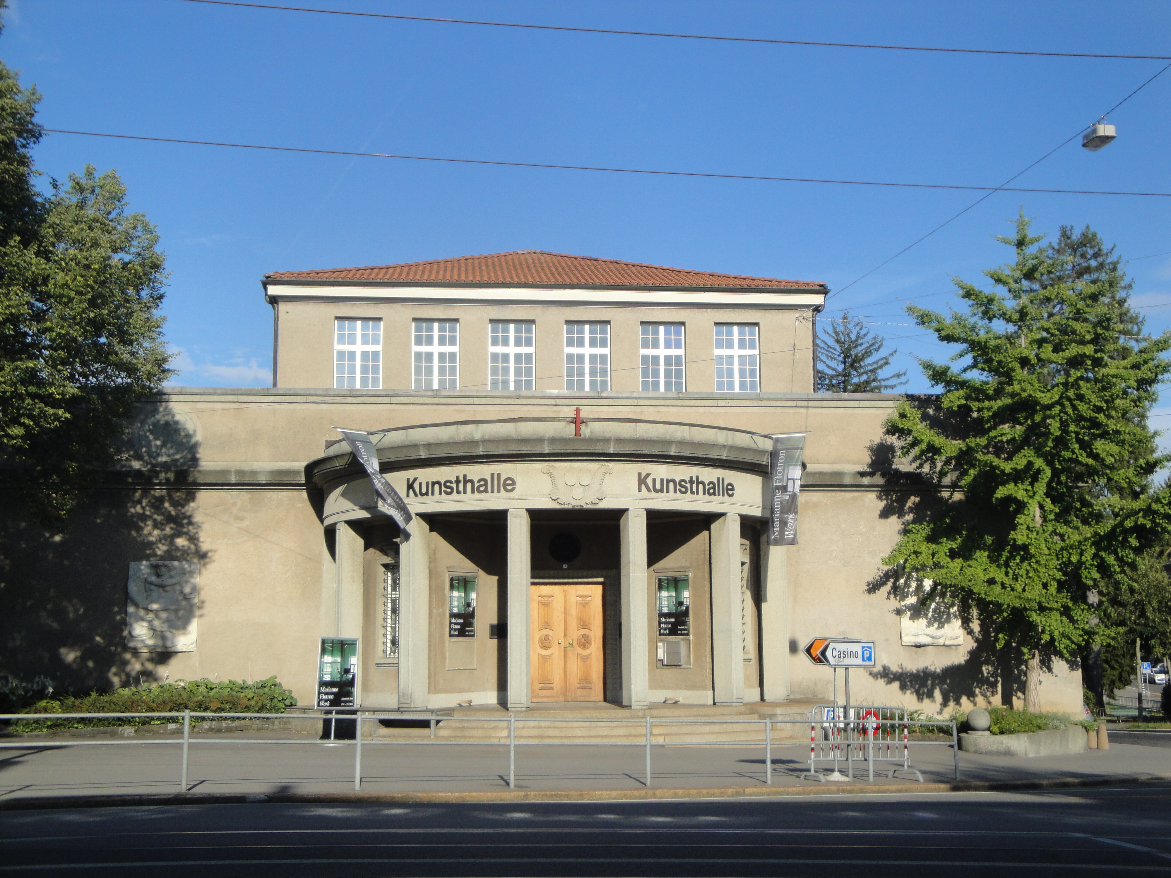 Bern, Eingang Kunsthalle mit dem Kalksteinreliefs von 1946, links Inspiration und rechts Création von Gustave Piguet.